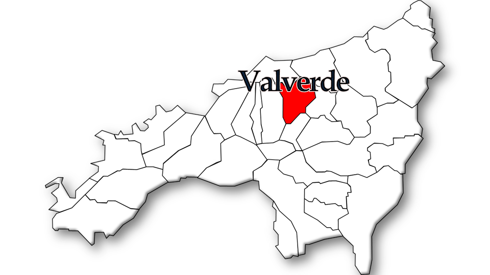 População